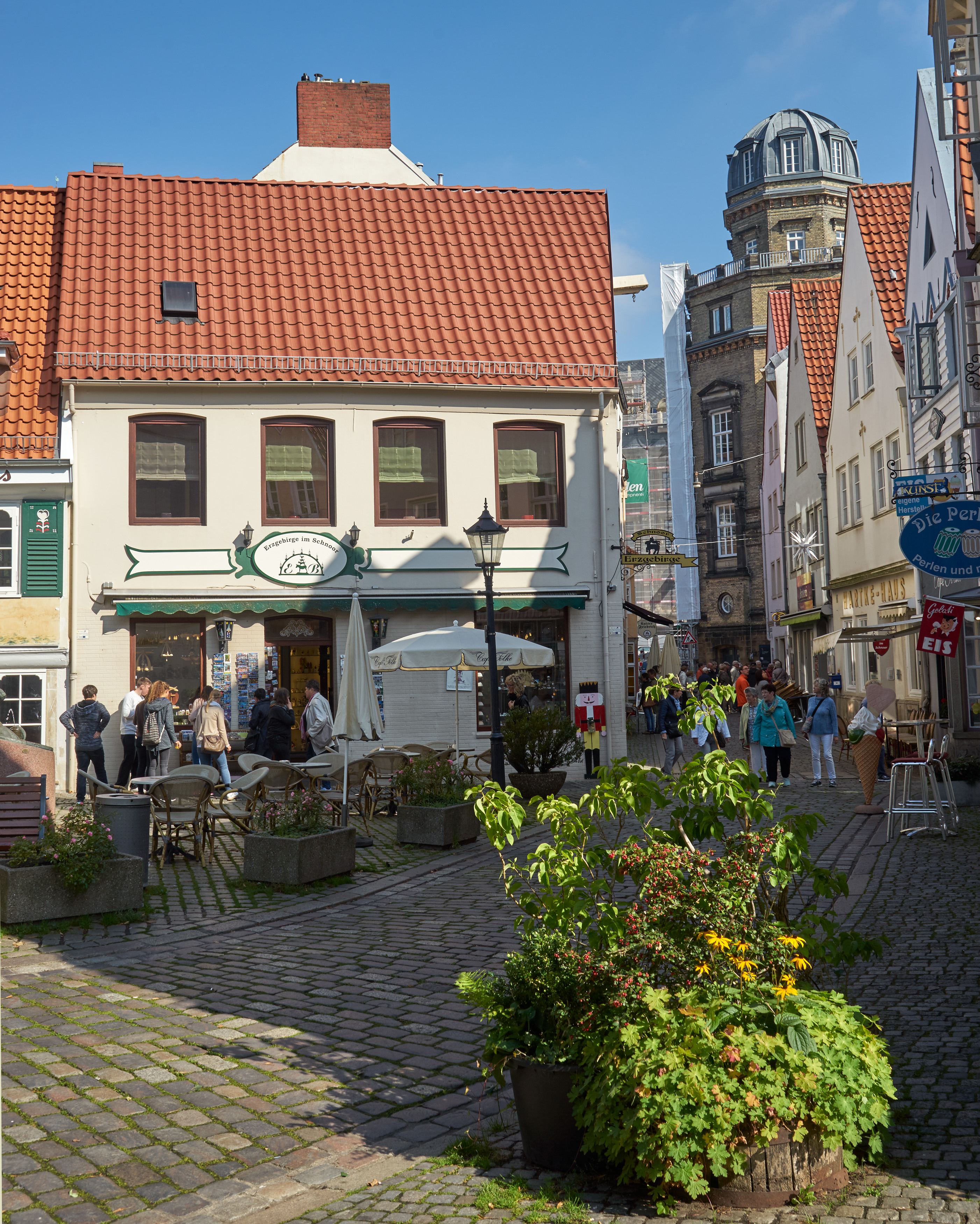 Wohnhaus in Bremen, Stavendamm 14Das abgebildete Objekt ist ein geschütztes Kulturdenkmal in der Freien Hansestadt Bremen, mit der Nr. 1483 beim Landesamt für Denkmalpflege registriert.